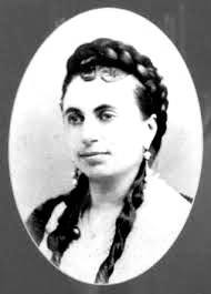 Фотография дочери Дюма отца Мари Александрин Дюма. Около1865.